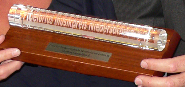 Praetorius Musikpreis, die Auszeichnung, hier für Thomas Hengelbrock, 2012